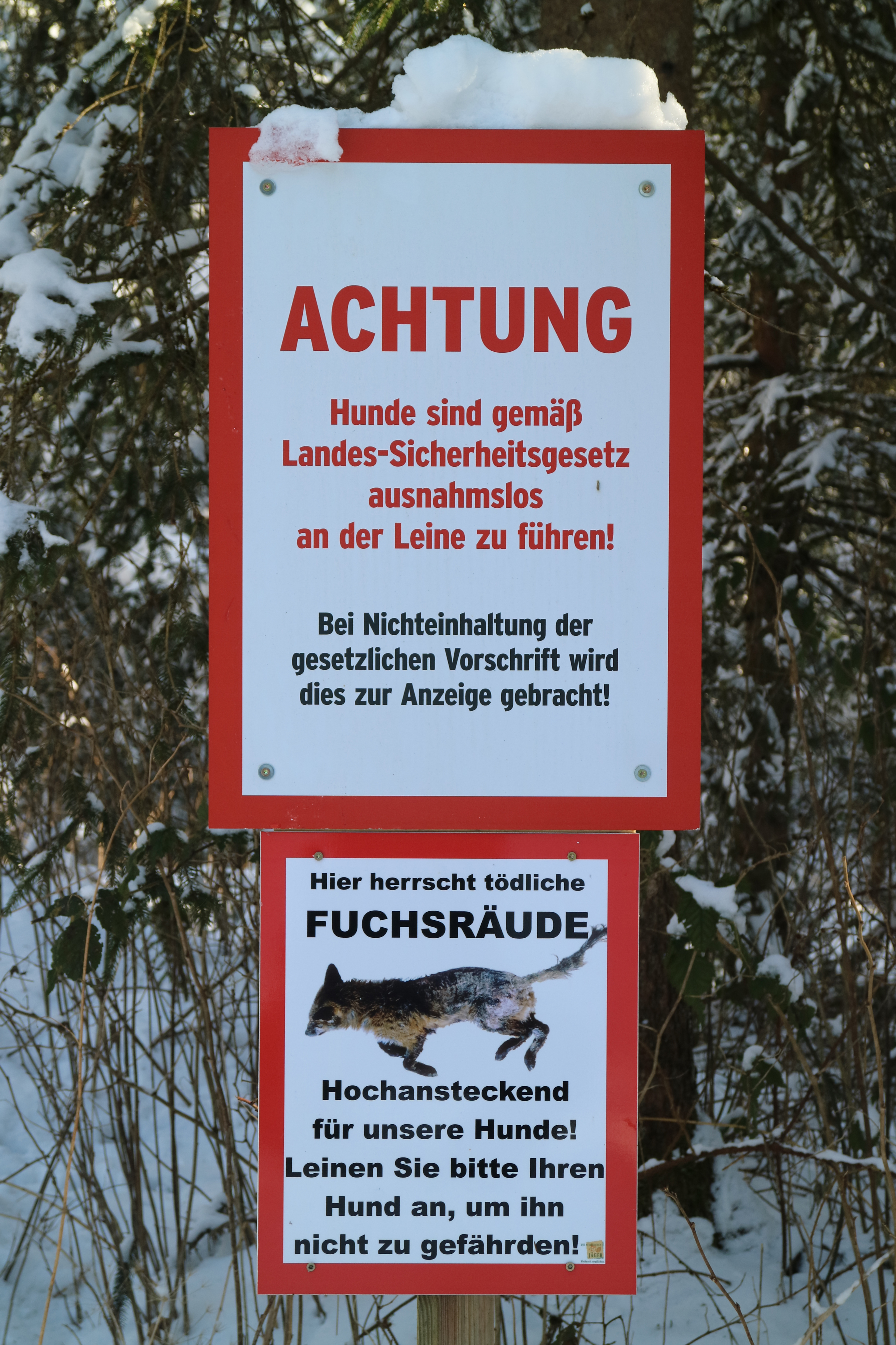 Fuchsräude-Warntafel im Kaiserwald